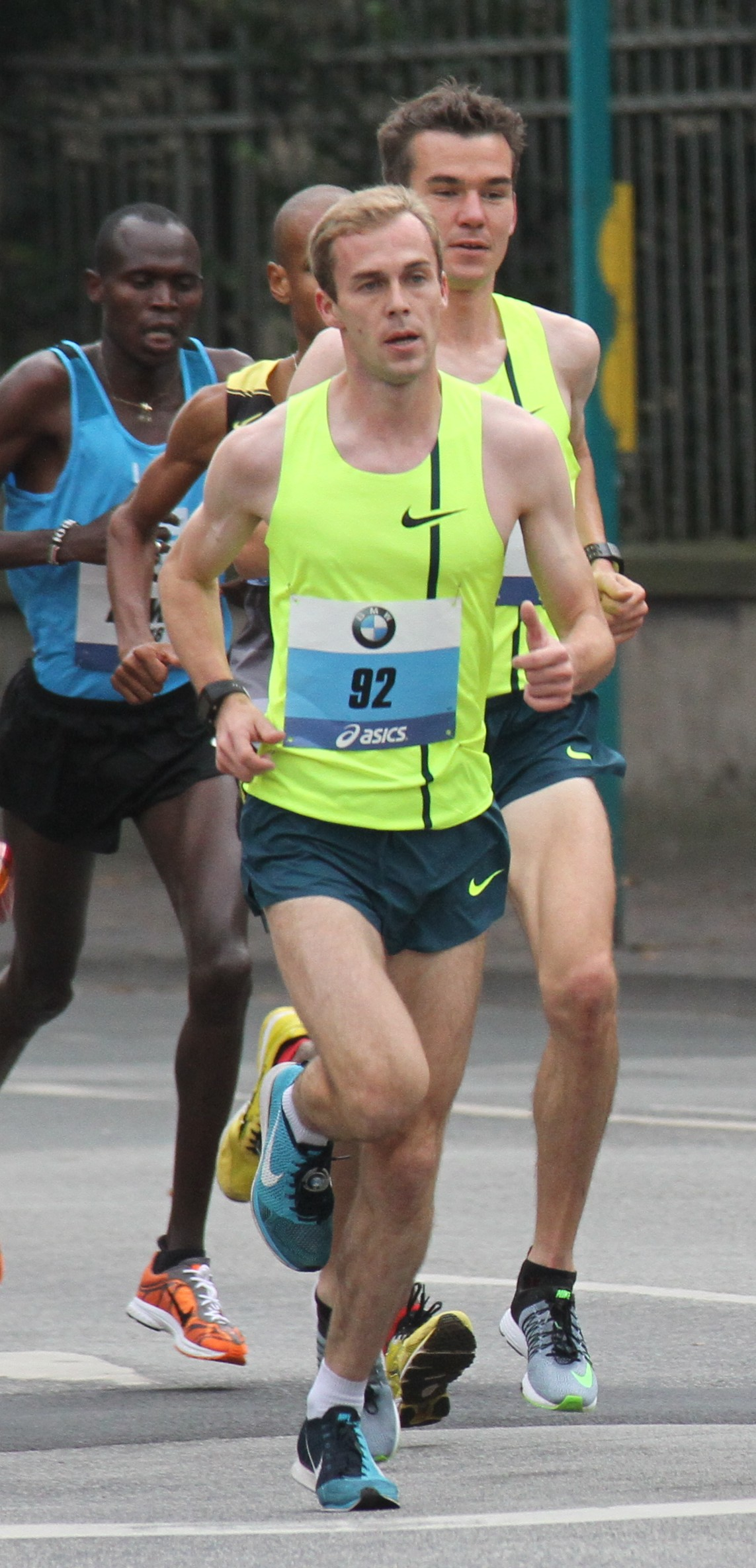 André Pollmächer während des Frankfurt Marathons 2014